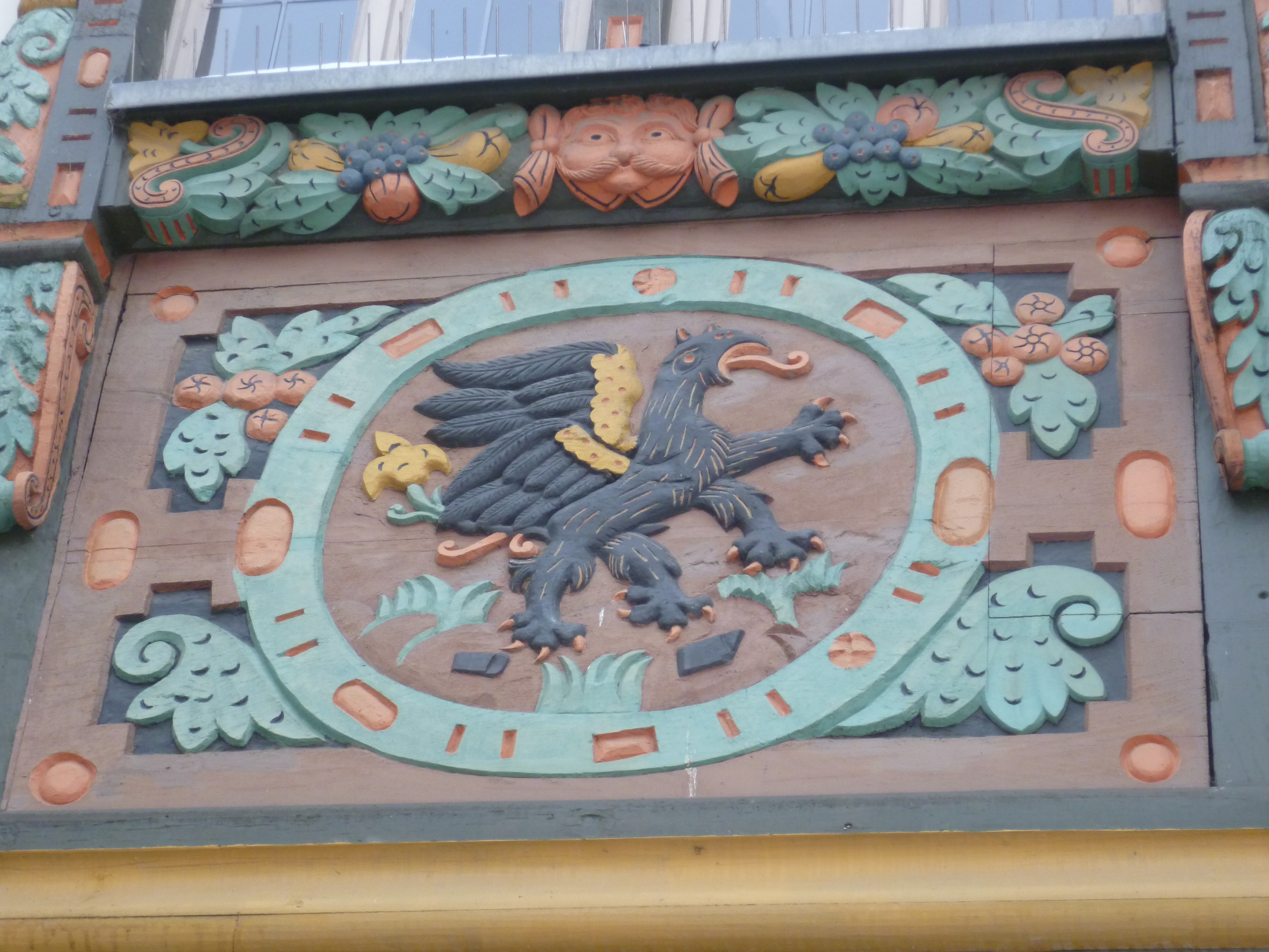 Dekoration des Killingerhauses in Idstein